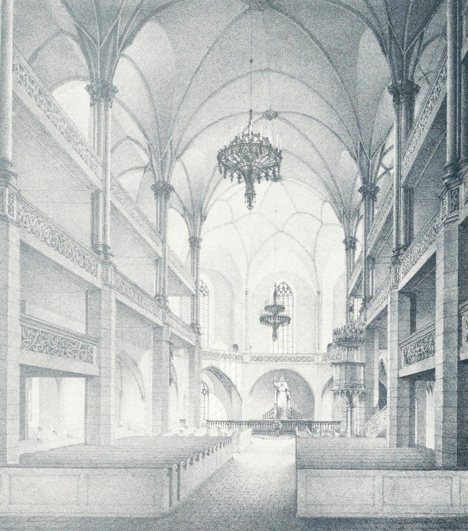 Inneres der Michaeliskirche, Zeichnung von Georg Könitzer